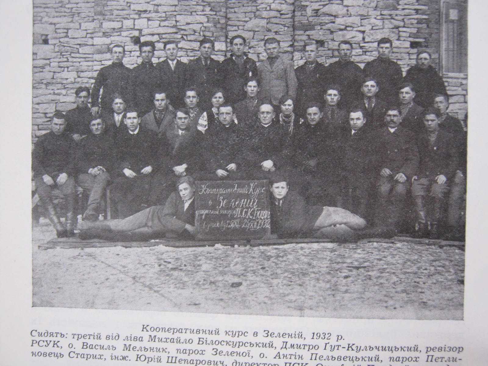 Коперативний курс. Зелена, 1932